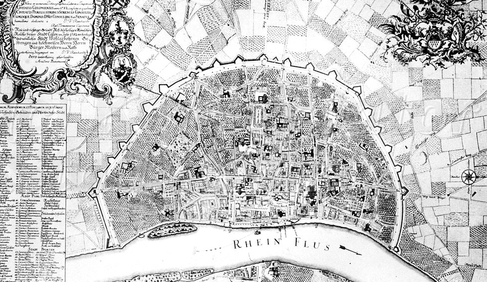 Kupferstich: Stadtplan Reinhardt (1752)